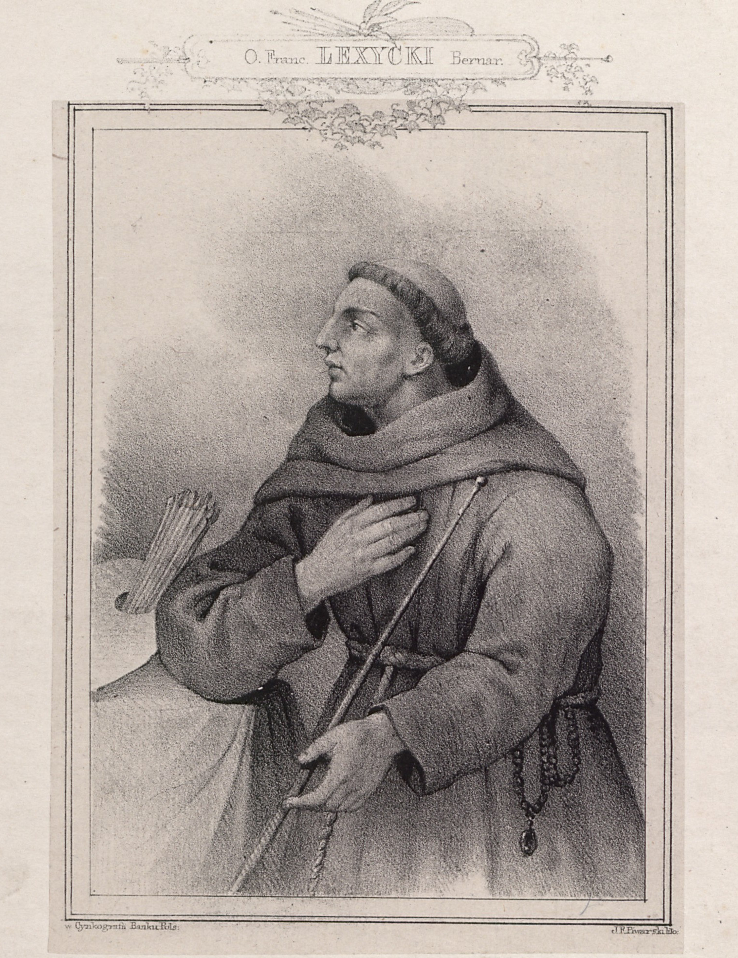 Franciszek Lekszycki